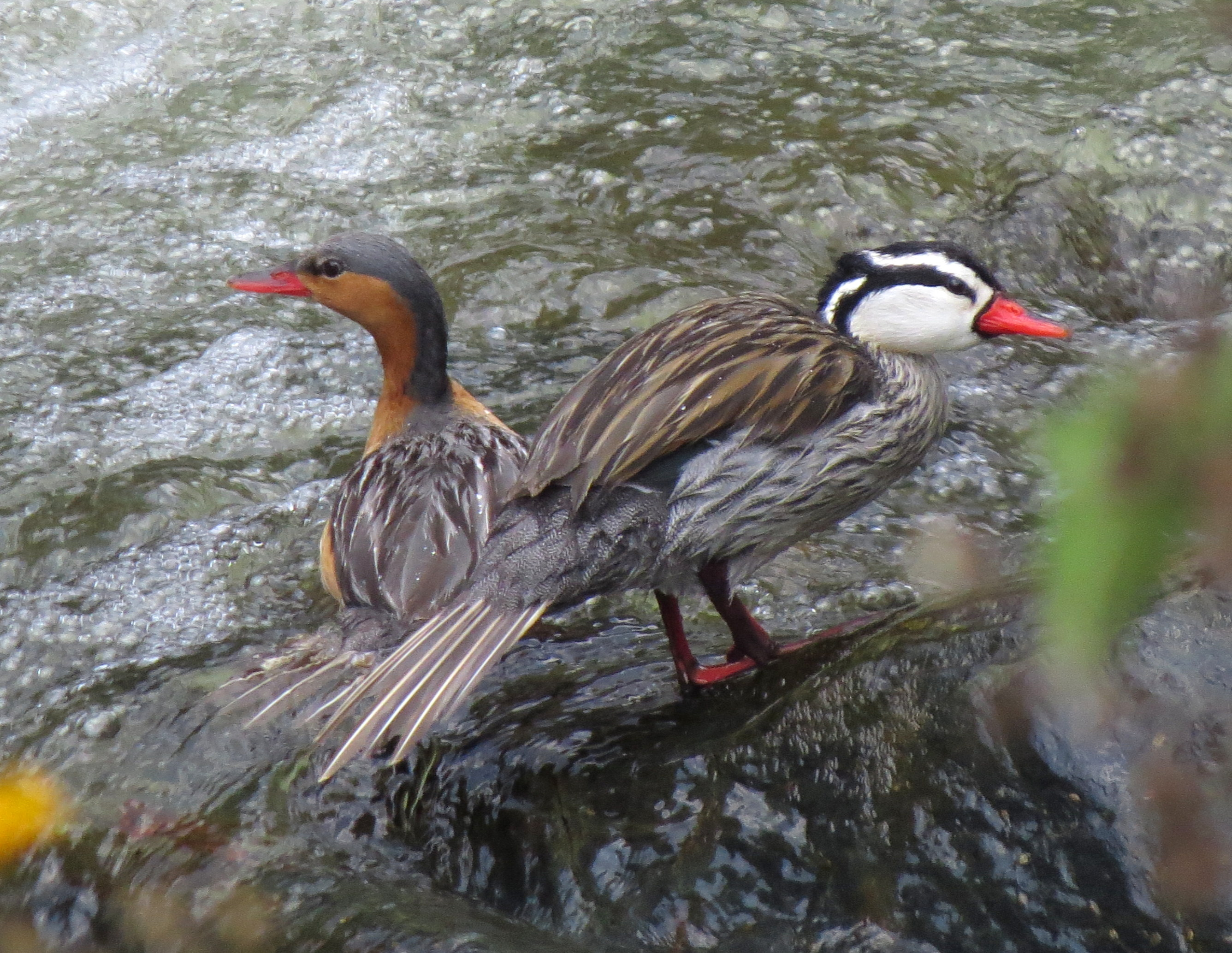 Merganetta armata (Pato de torrente)